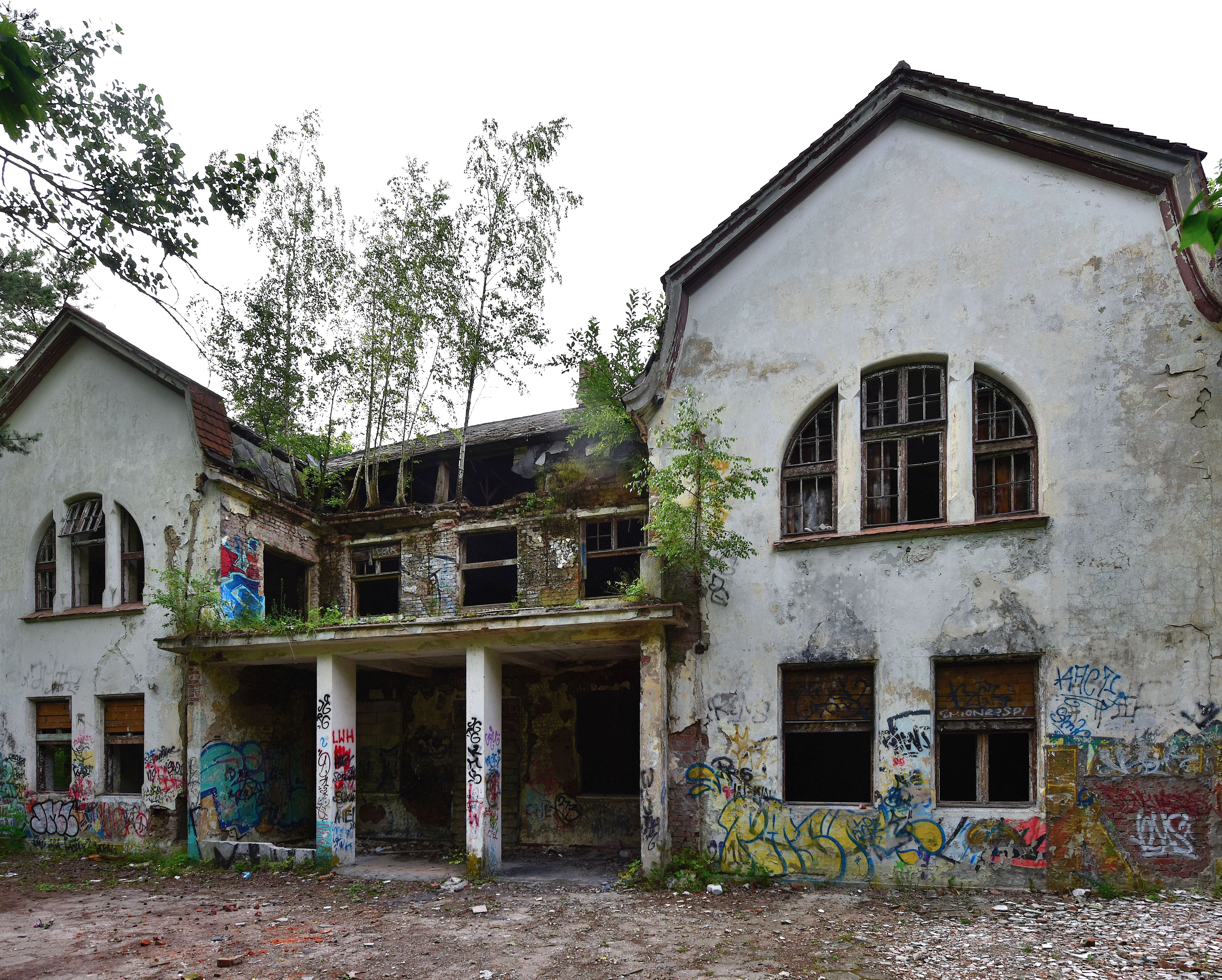 Jeden z budynków Zakładu dla Nerwowo i Psychicznie Chorych Żydów "Zofiówka" w Otwocku